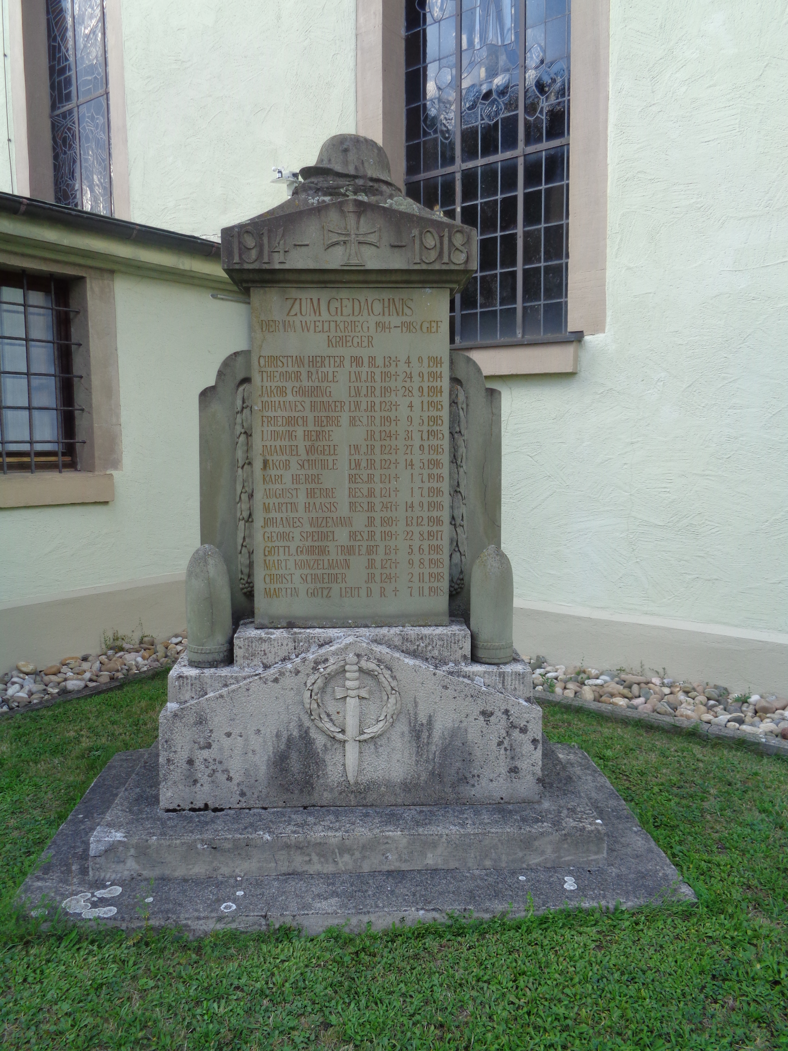 Hochholzstraße 14 in Zillhausen bei Balingen, Denkmal für die Gefallenen des Ersten Weltkriegs vor der evangelischen Kirche (rechteckiger, verputzter Saalbau mit Einturmfassade, 1938 von Carl Christian Nieffer)